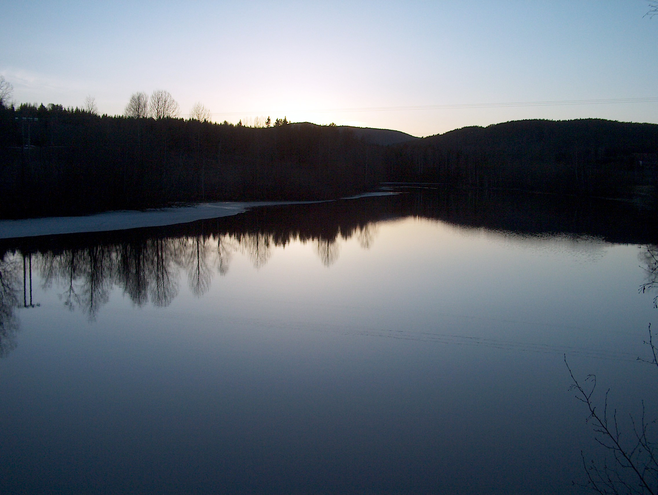 Verkenselva nord for Verkensfossen/dammen